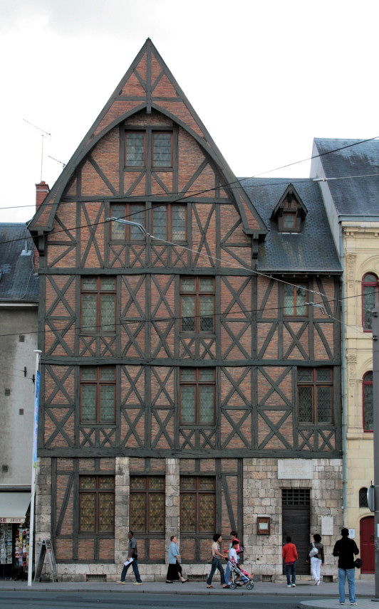 Haus von Jeanne d'Arc in Orleans